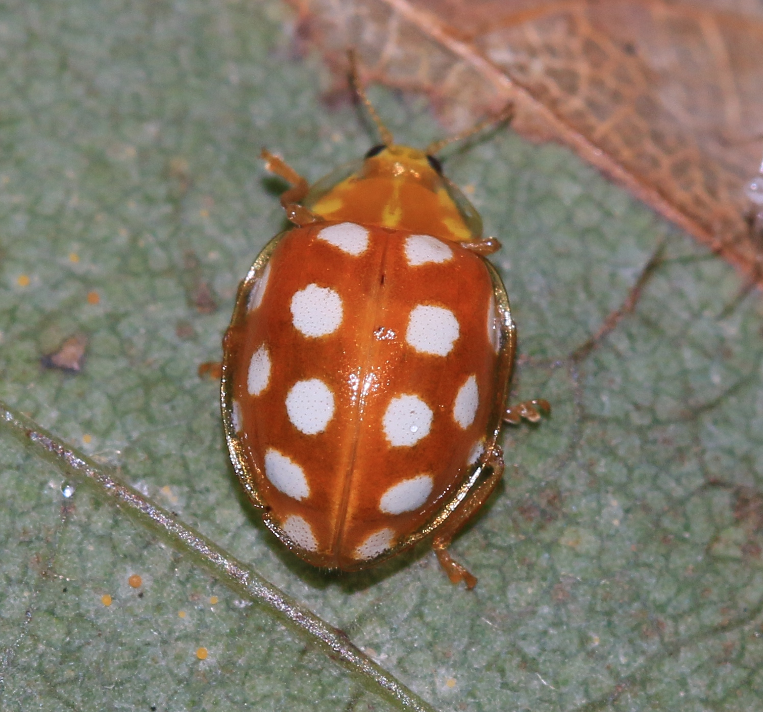 Halyzia 16-guttata (Orange ladybird)